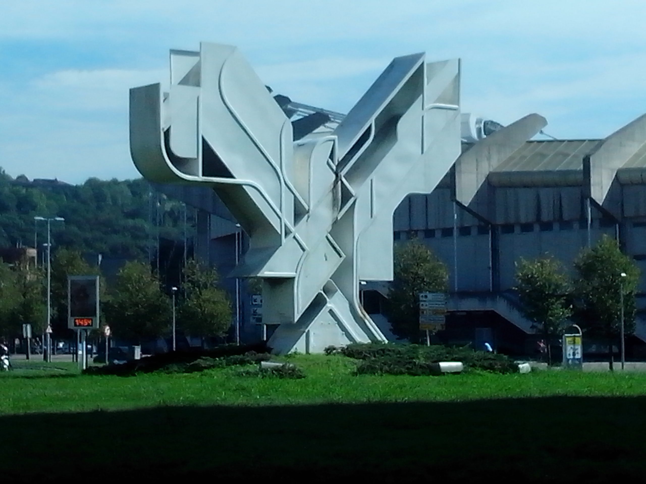 Nestor Basterretxearen "Bakearen Usoa" Donostiako Aita Donostia Plazan